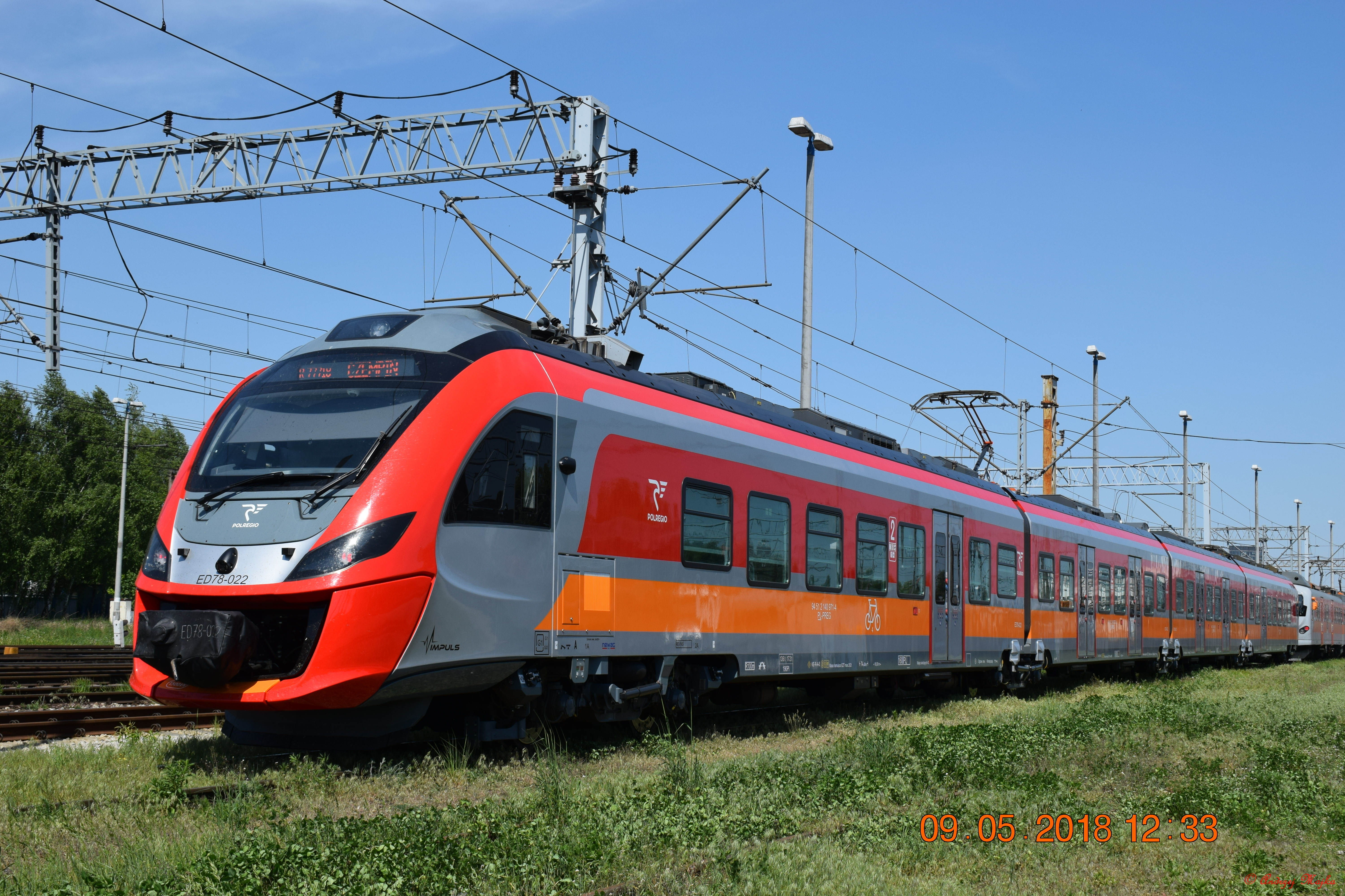 W Poznaniu kolorowo